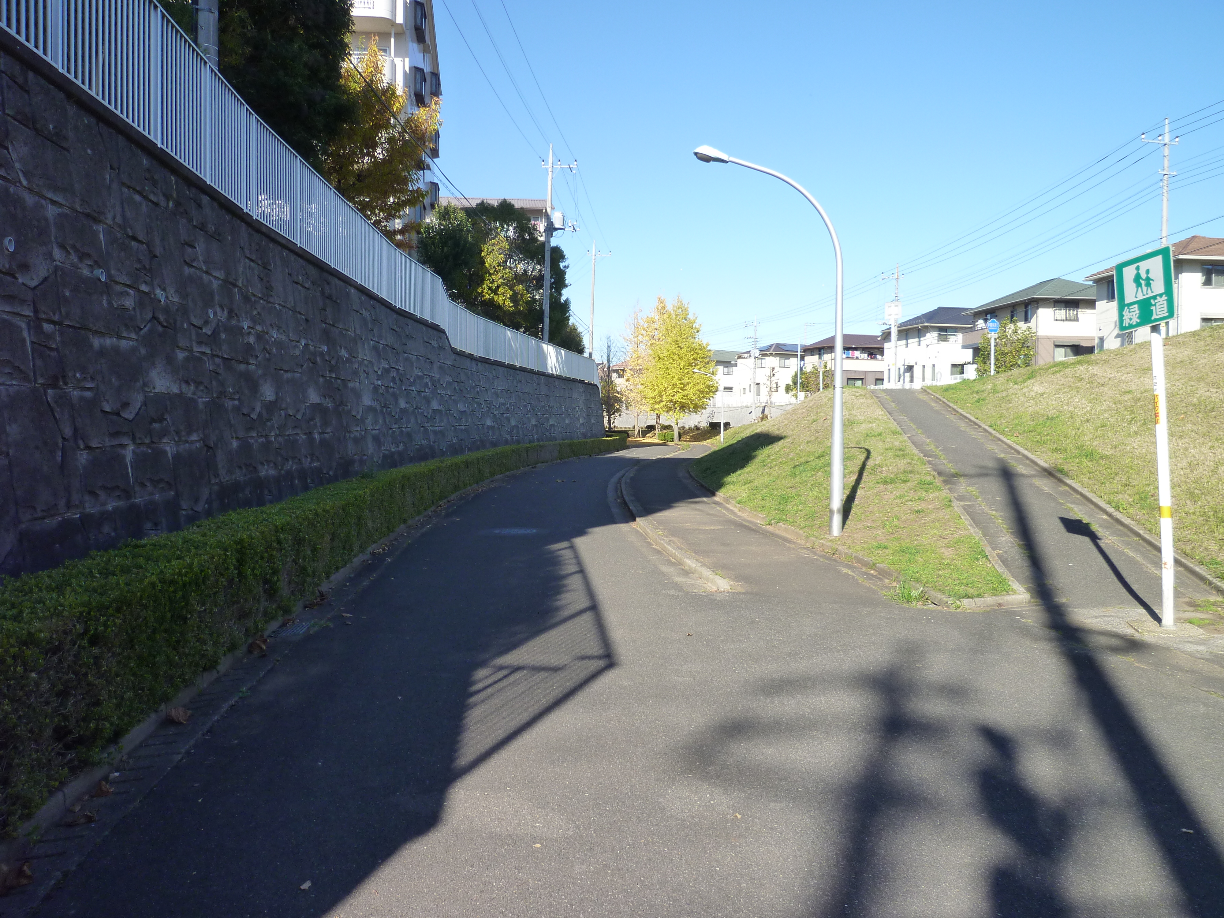 緑道（玉造付近） 左手にある緑色の看板が「歩行者専用」を示す緑道の標識。実際には自転車の通行までが認められている。